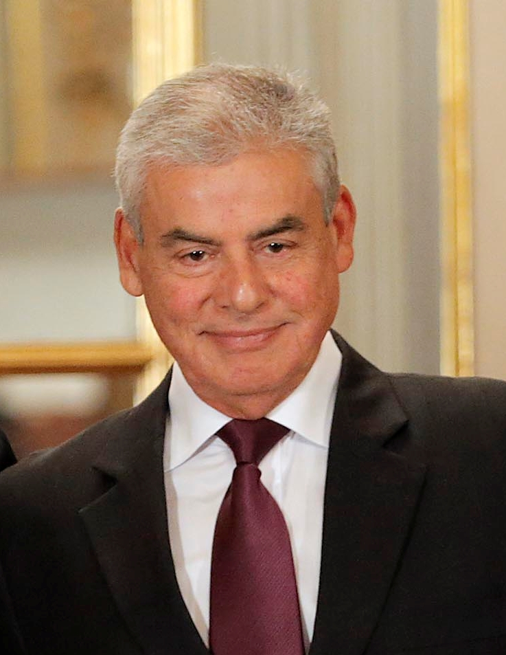 César Villanueva Arévalo, presidente del Consejo de Ministros del Perú (2013-2014) y presidente regional de San Martín (2007-2013).